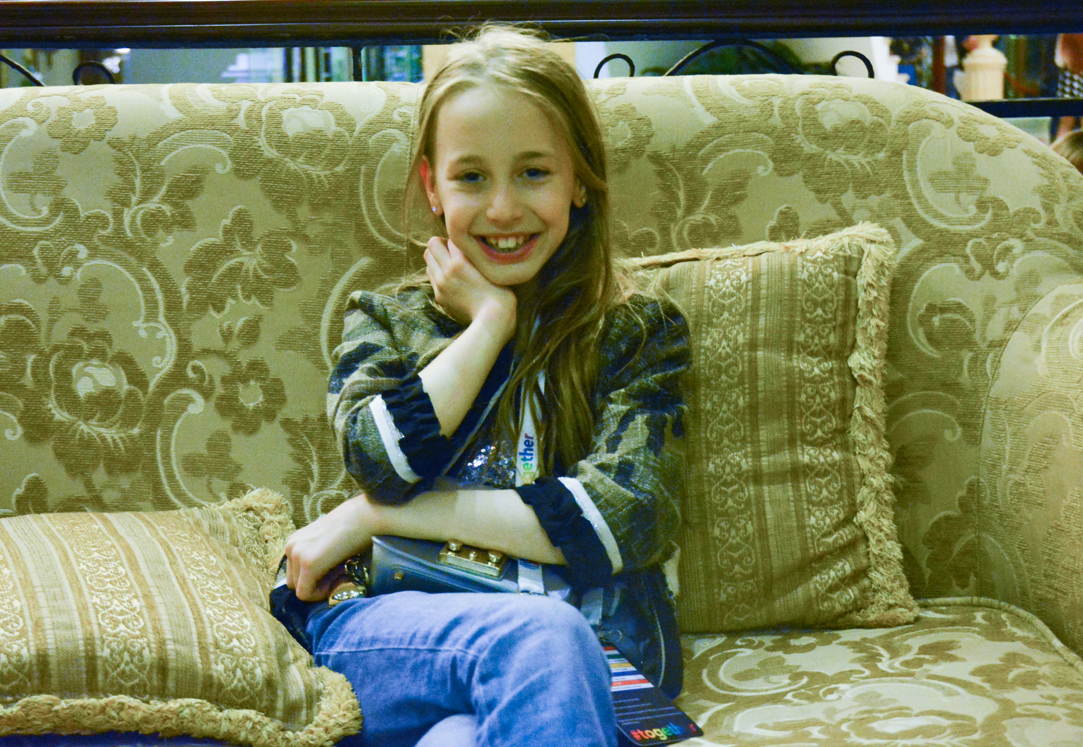 Lizi Pop (Лиза Джапаридзе), участница Детского Евровидения 2014 от Грузии. На интервью для